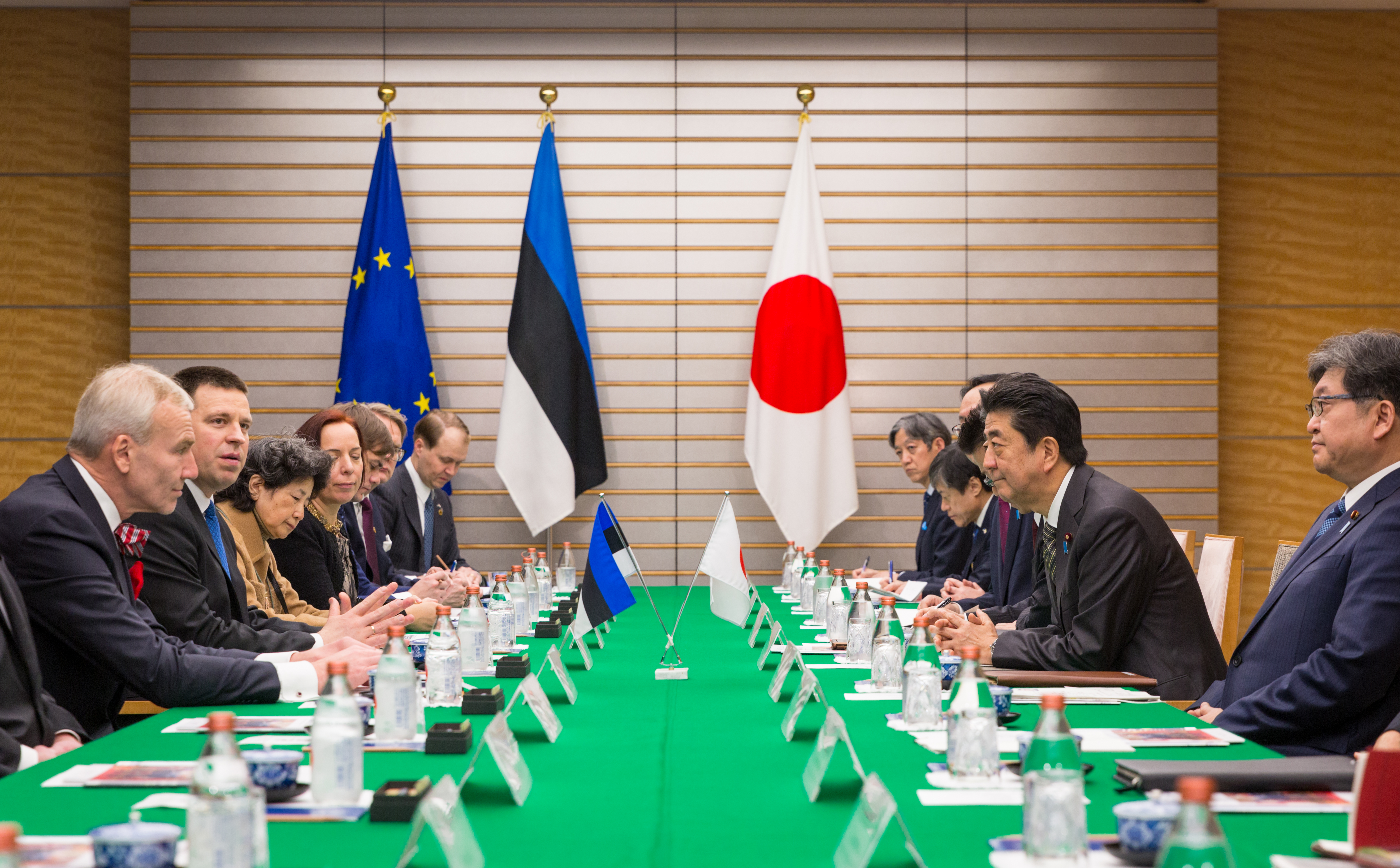 Eesti delegatsioon kohtumas Jaapani peaministri Shinzō Abe’ga